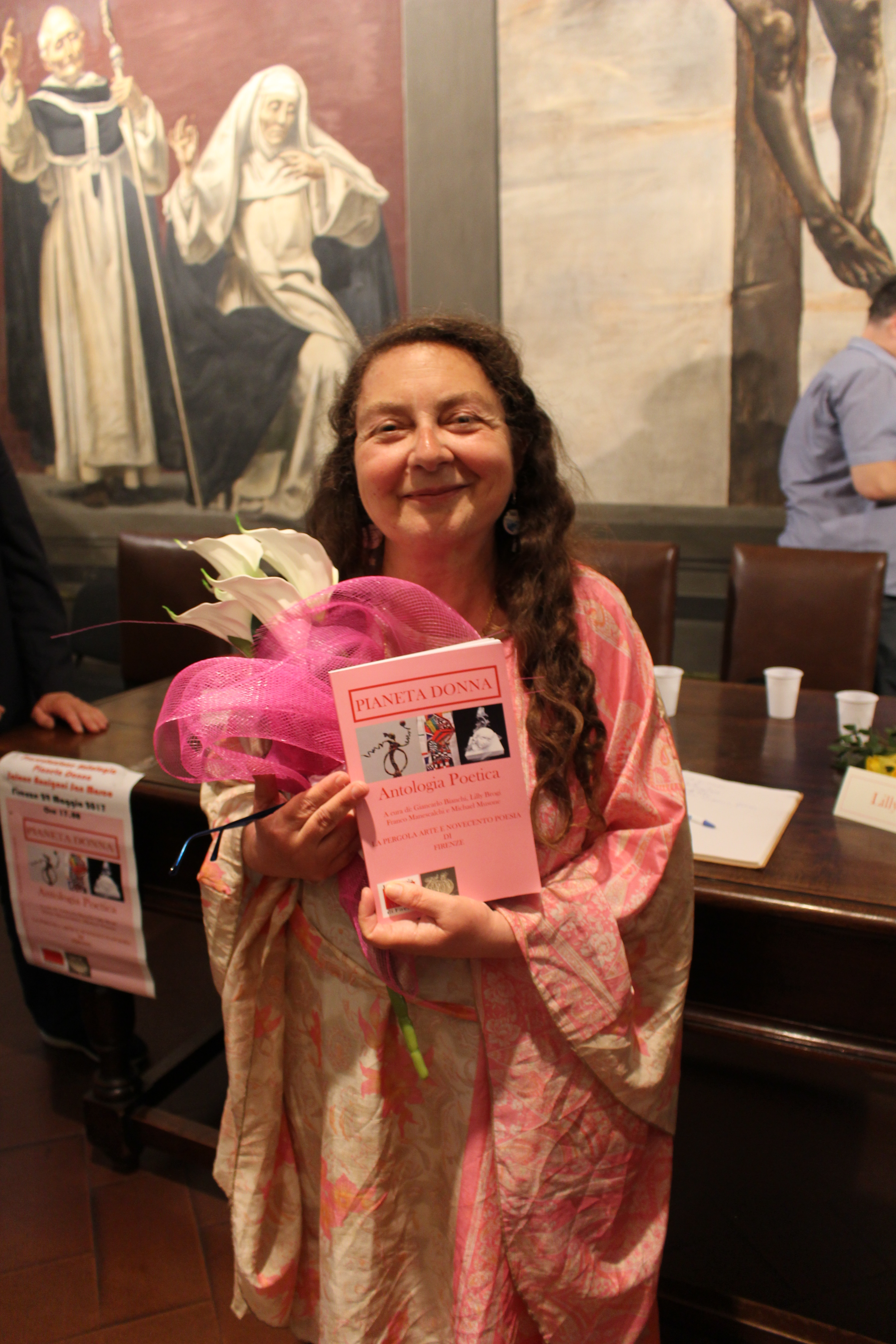 Presentazione dell'Antologia Pianeta Donna al Salone Annigoni della Basilica di San Marco